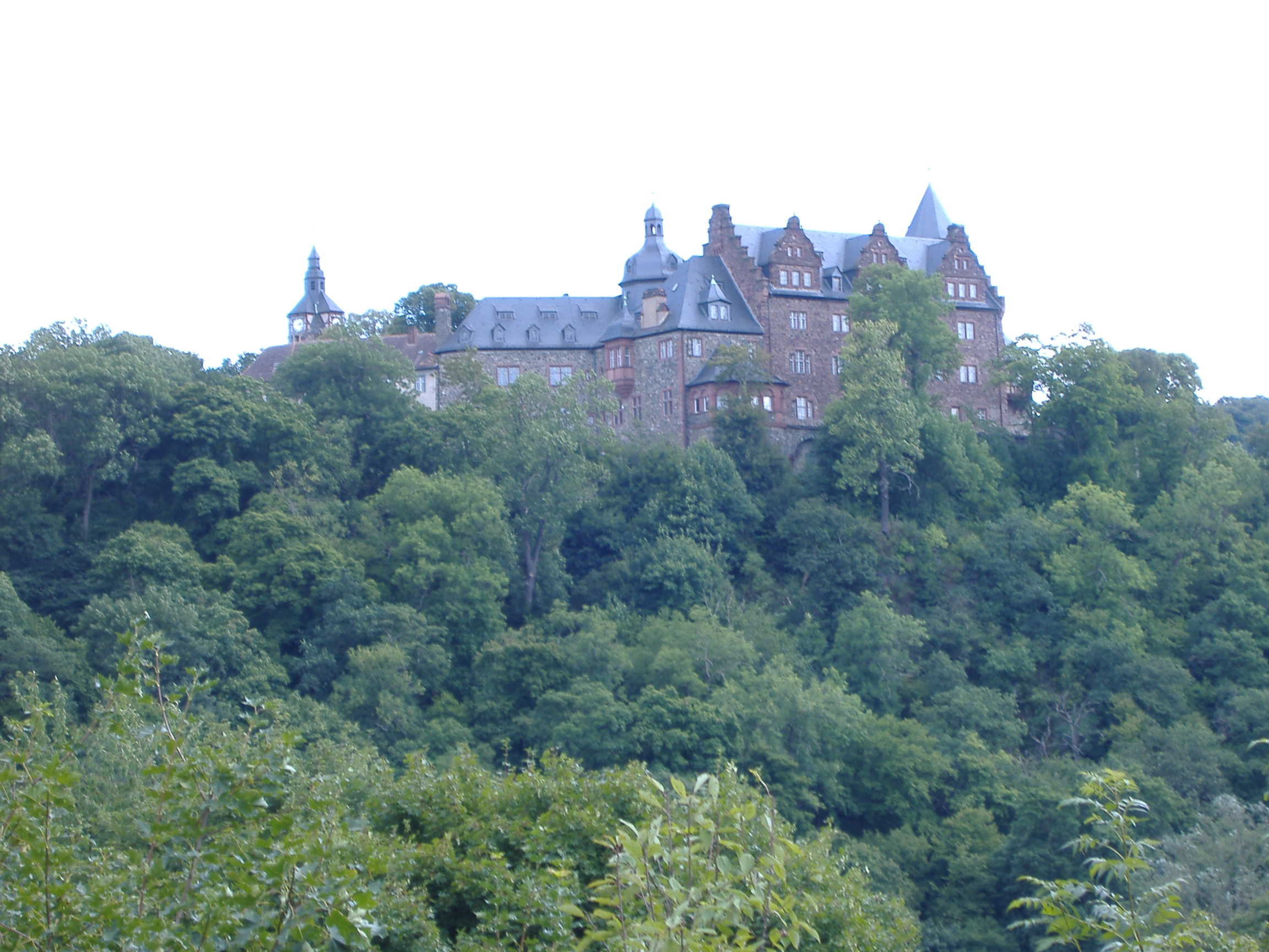 Rammelburg im Ostharz (Sachsen-Anhalt)